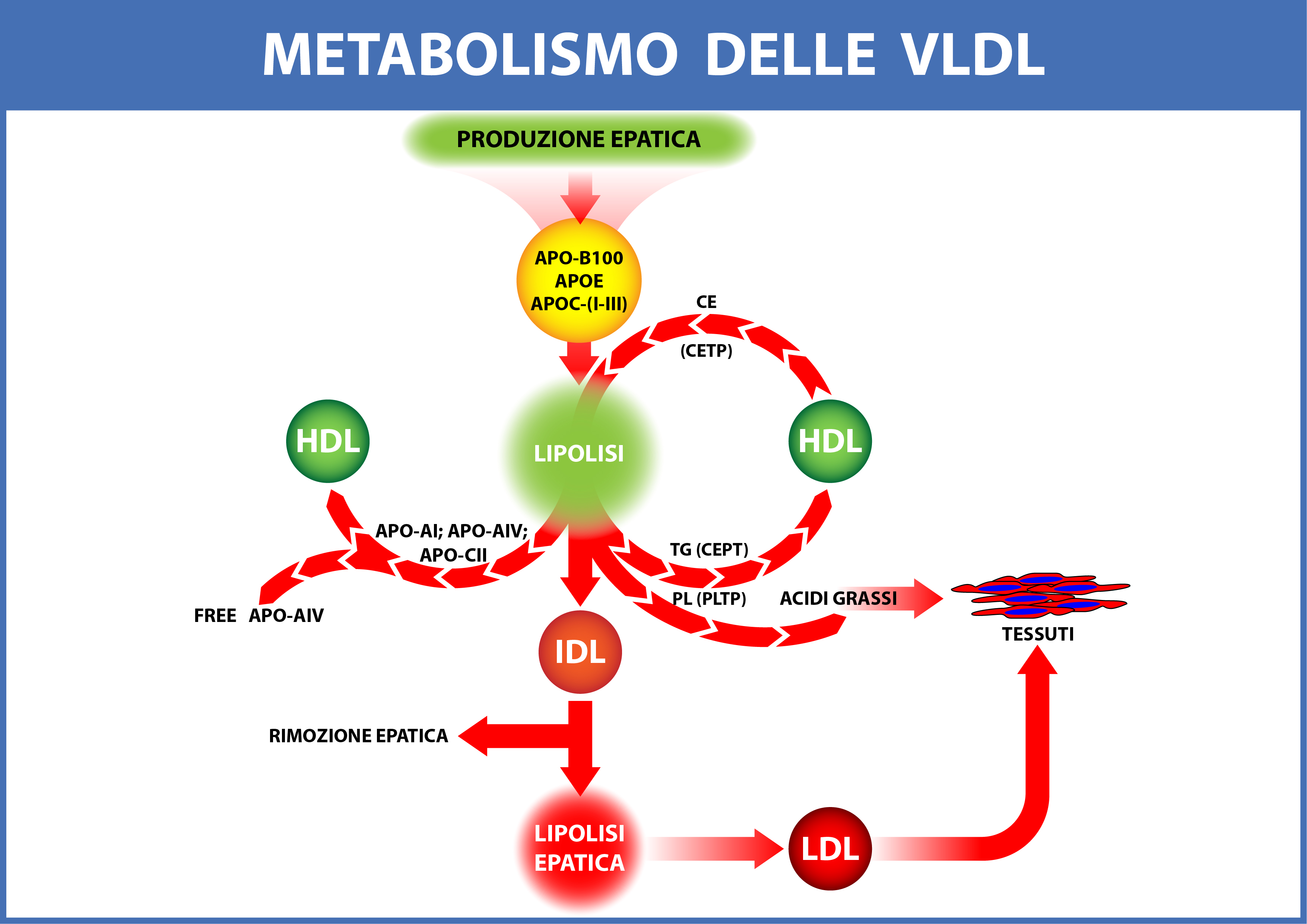 Schema del metabolismo dellle VLDL